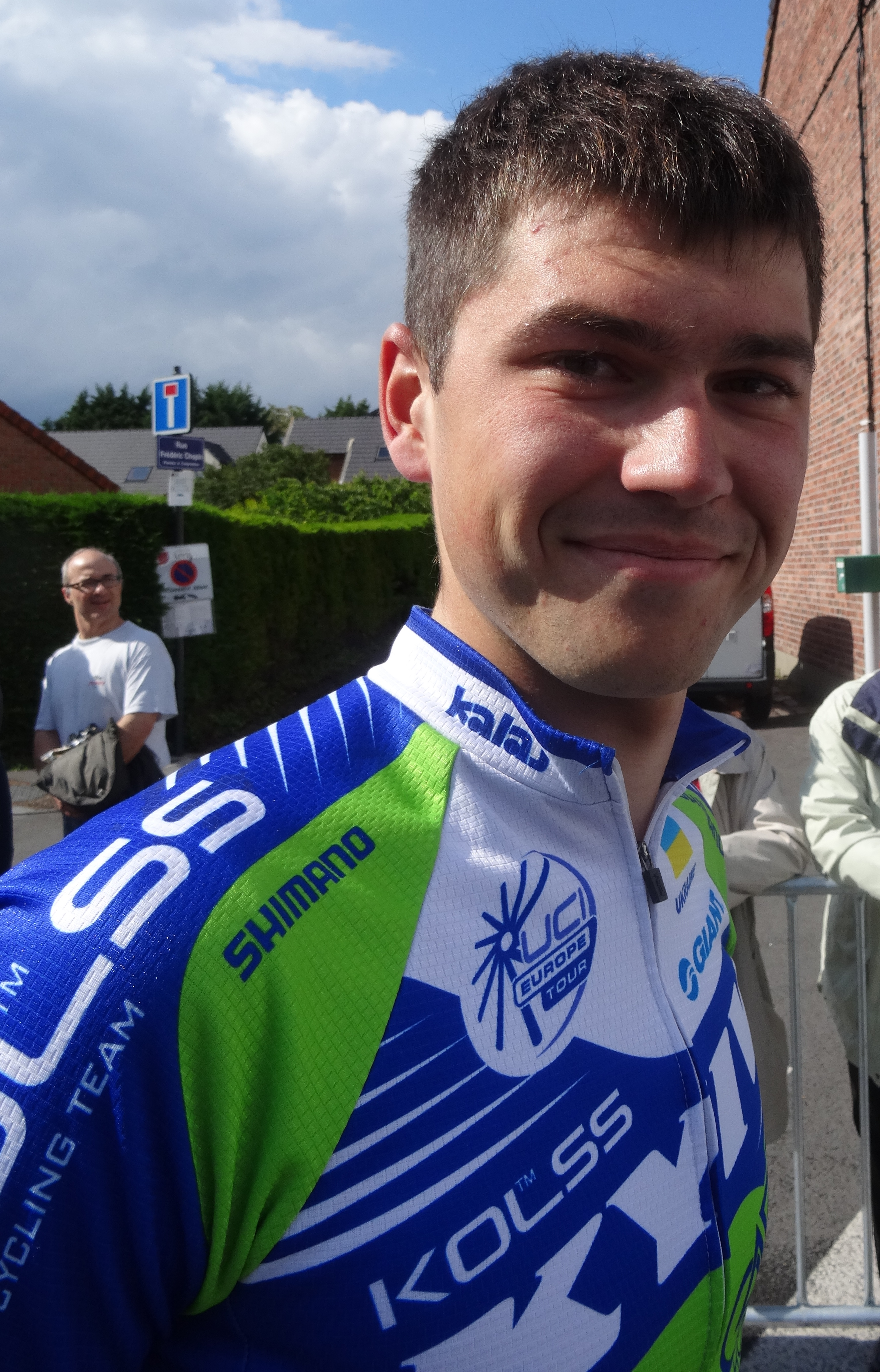 Reportage photographique réalisé le vendredi 23 mai 2014 à l'occasion du départ de la première étape du Paris-Arras Tour 2014 à Lens, Pas-de-Calais, Nord-Pas-de-Calais, France. Depicted person: Andrii Bratashchuk